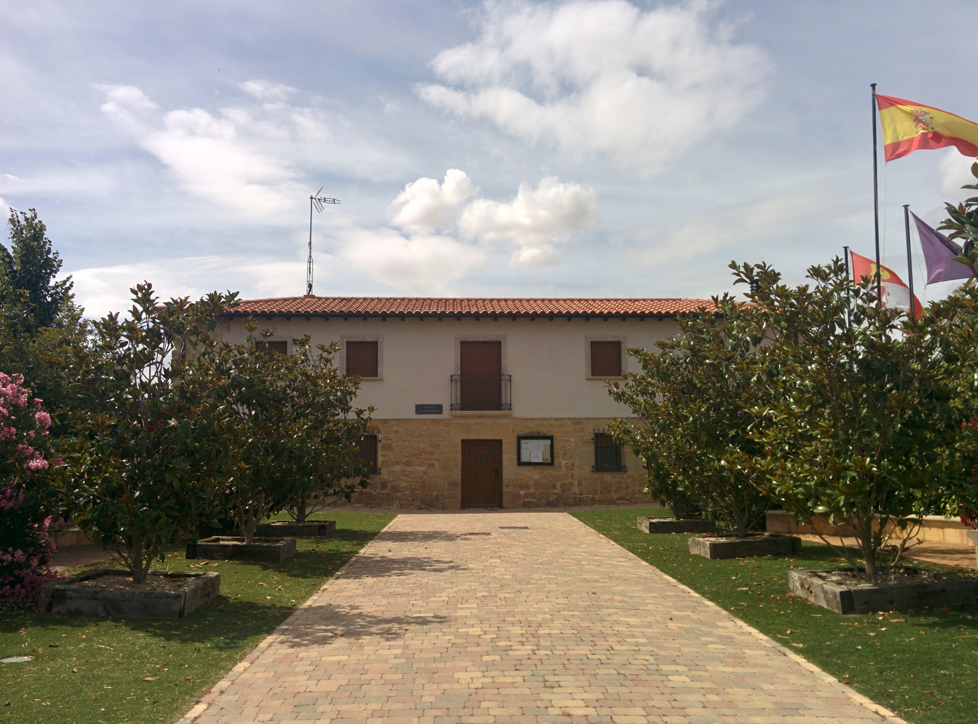 Casa consistorial de Villodre (Palencia, España).